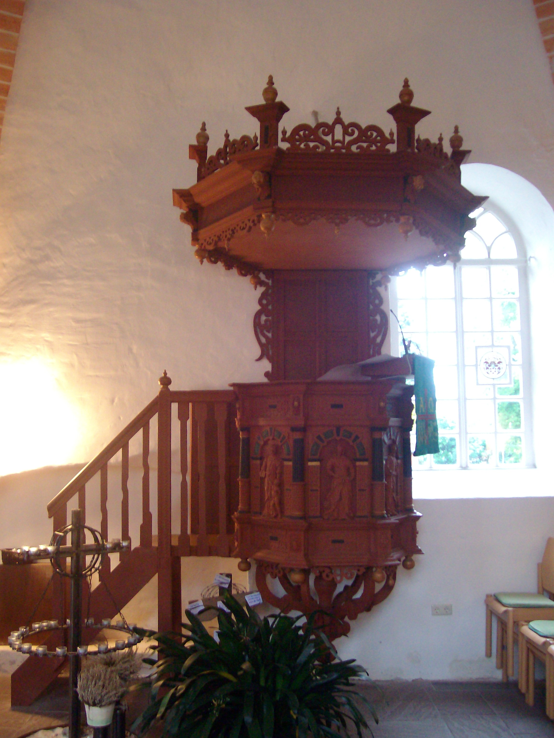 Kanzel in Völlen, Westoverledingen, Ostfriesland